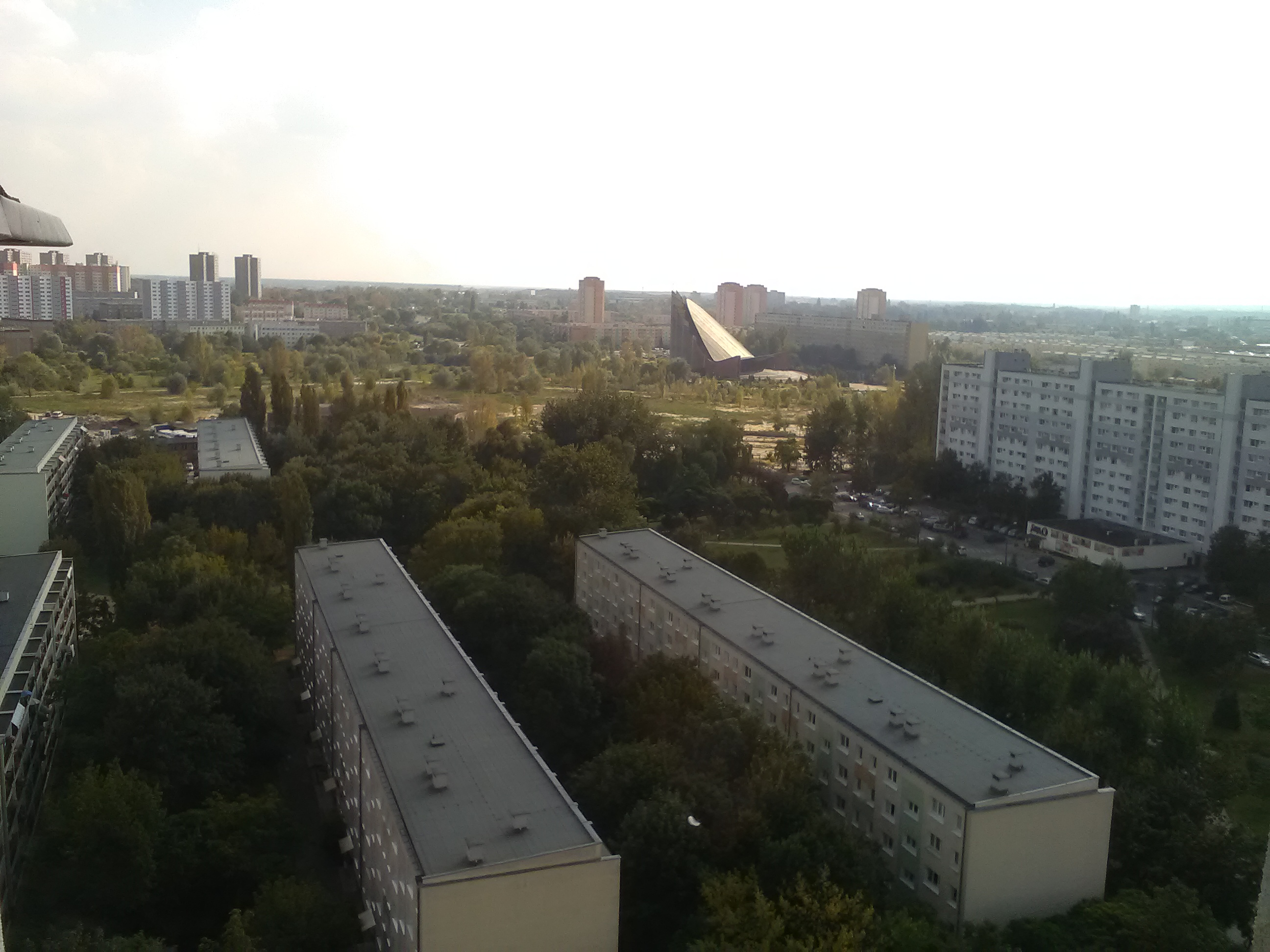 Panorama osiedla Powstań Narodowych w Poznaniu, w tle kościół Nawiedzenia Najświętszej Maryi Panny